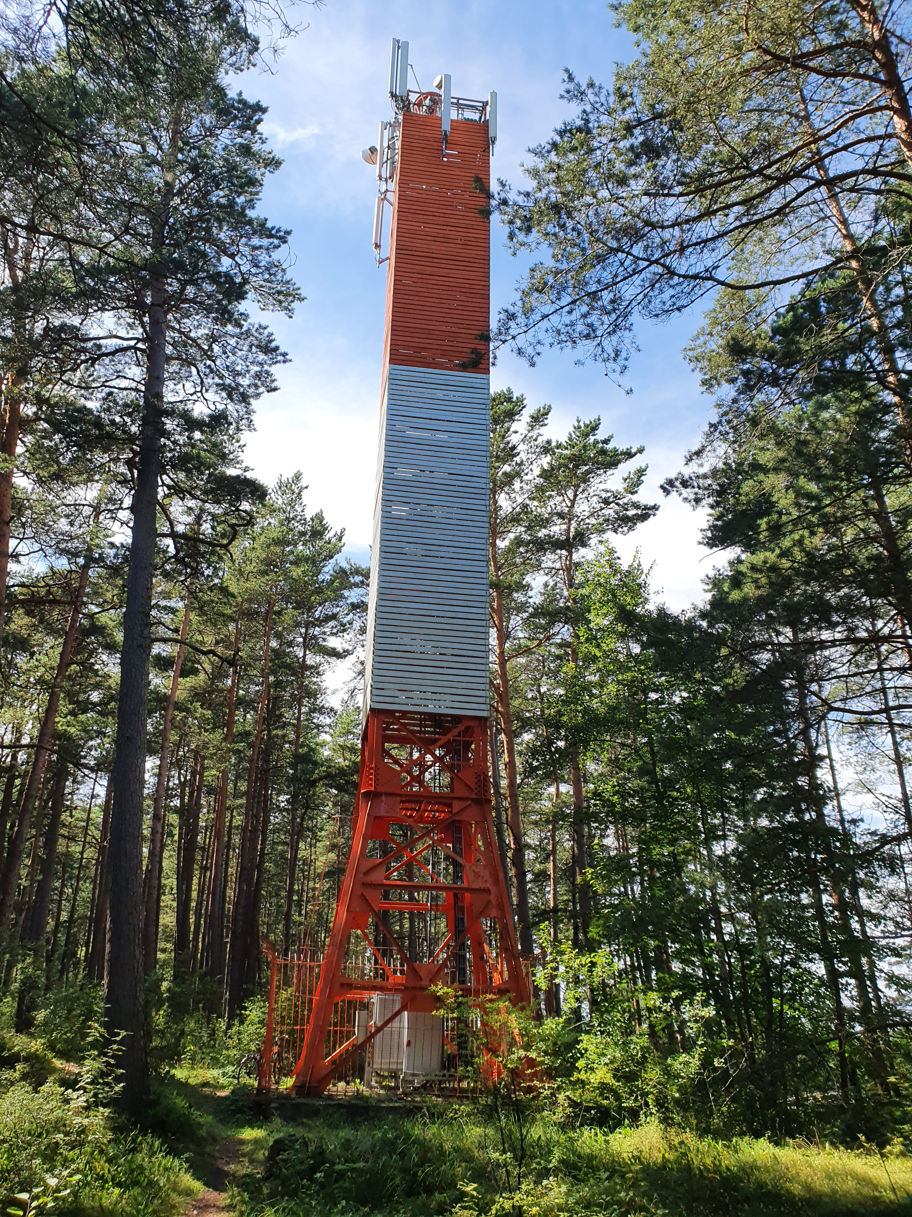 Буллюциемский маяк, август 2020.